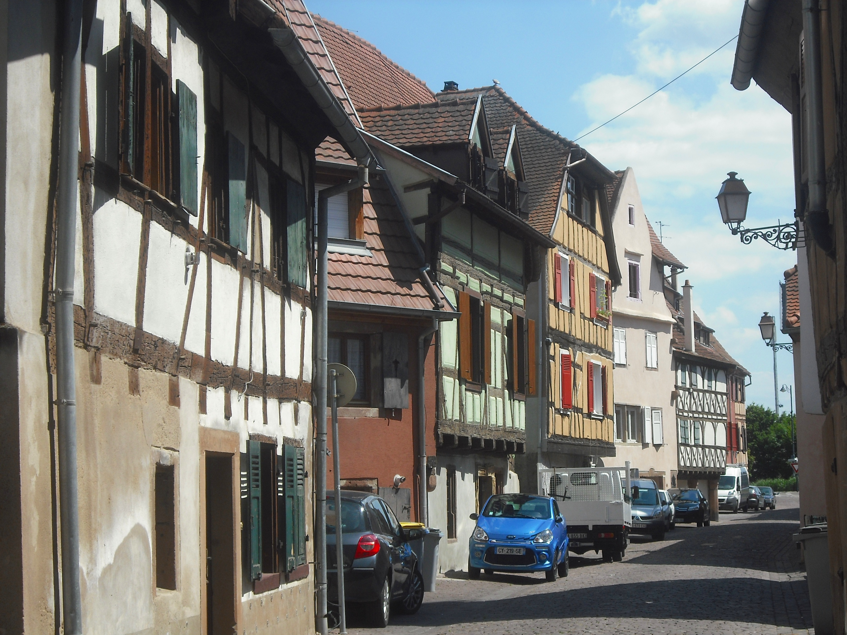 Quai des Tanneurs, Sélestat, Bas-Rhin, France.